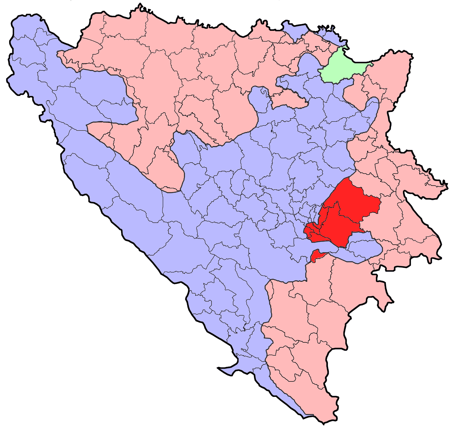 Istočno Sarajevo location map